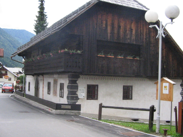 Lizenjakova domačija, Kranjska gora, Slovenija, vhodna stran